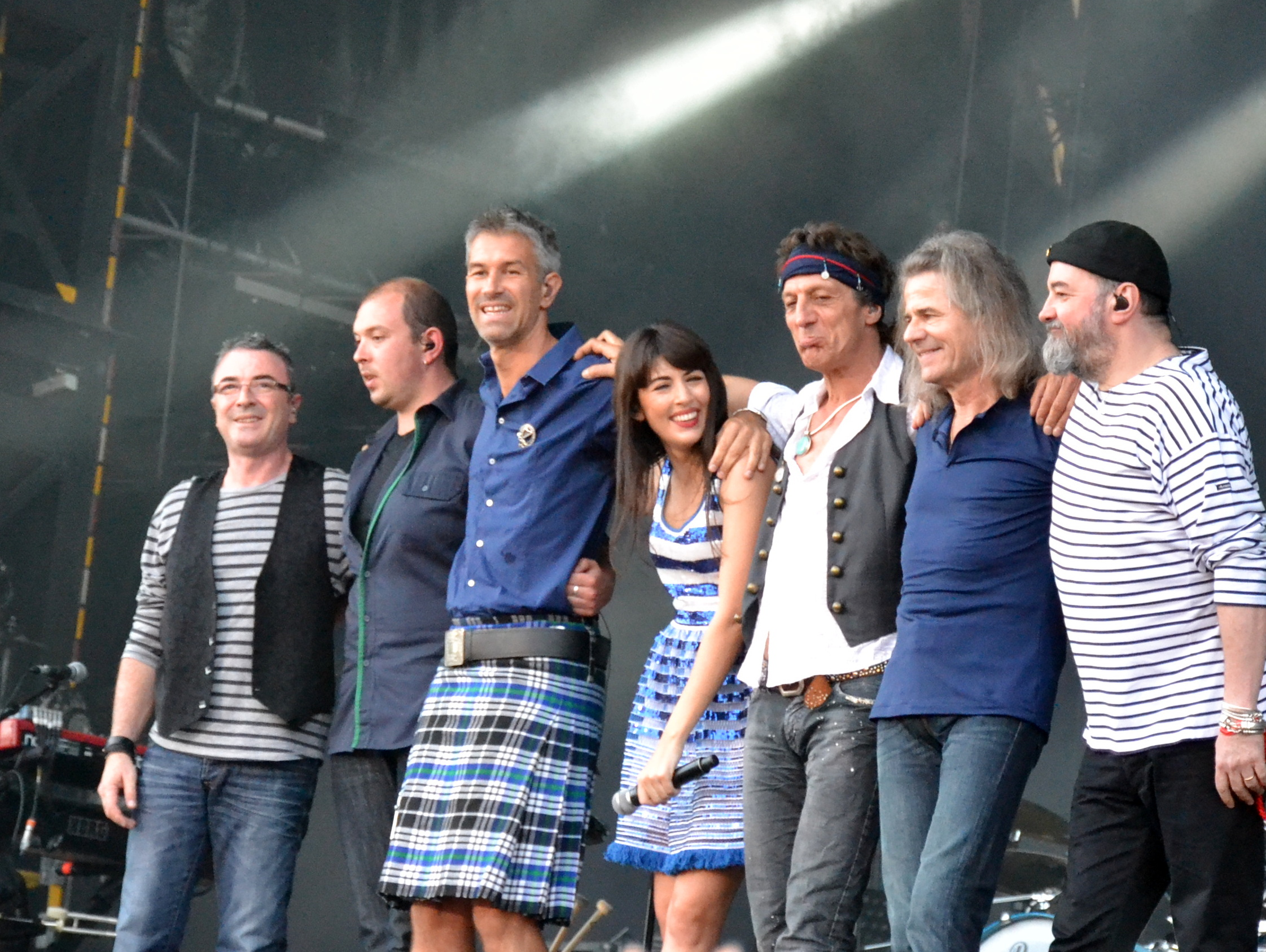 Tournée "Bretonne" de Nolwenn Leroy en mai 2012 au Festival Papillons de nuit.